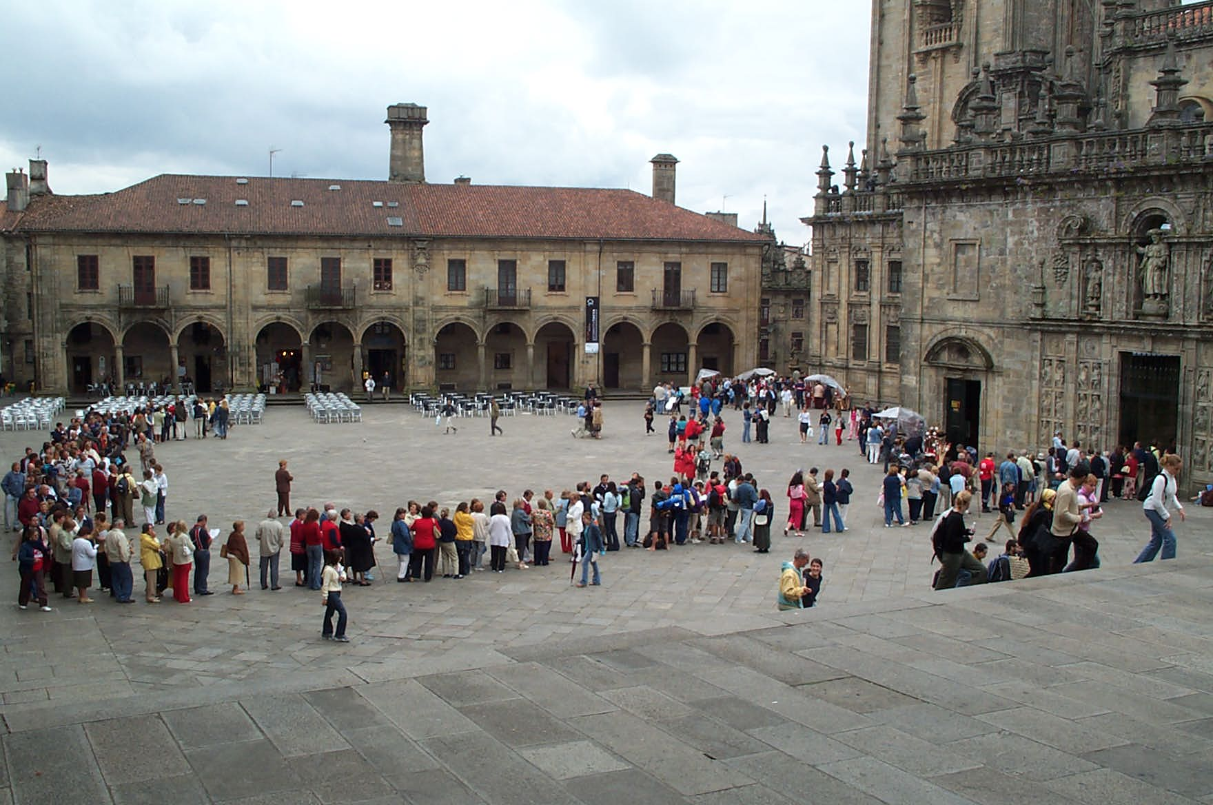 Apertura Porta Santa da Catedral de Santiago de Compostela